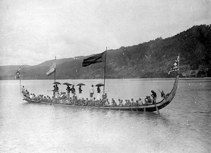 Repronegatief. Deze foto is gemaakt tijdens de Siboga Expeditie van 1899-1900. Hoewel er veel plaatsen in de Molukken waren waar scheepsbouw plaatsvond, hebben vooral de Tanimbar en Kei Eilanden bekendheid verworven als plaatsen waar de bevolking gespecialiseerd was in het maken van boten. In feite exporteerden deze eilanden lokaal gemaakte boten, ondermeer door een maal per jaar met een hele vloot naar Banda en Ambon te varen. Daar werd dan een deel van die vloot gekocht. De prauwen (perahu) van de Kei en Tanimbar Eilanden hadden fraai bewerkte voor- en achterstevens, vaak bestaande uit stevenborden. Op Tanimbar trof men daarnaast ook een stenen boot aan in het centrum van het dorp die een belangrijke rol speelde in rituelen. (P. Boomgaard, 2001). Prauw van Groot-Kei